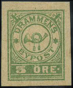 Почтовая марка местной почты Борресена в Драммене (Норвегия), 1888